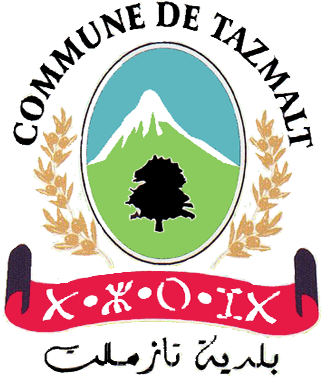 Blason de Tazmalt 04/07/2012